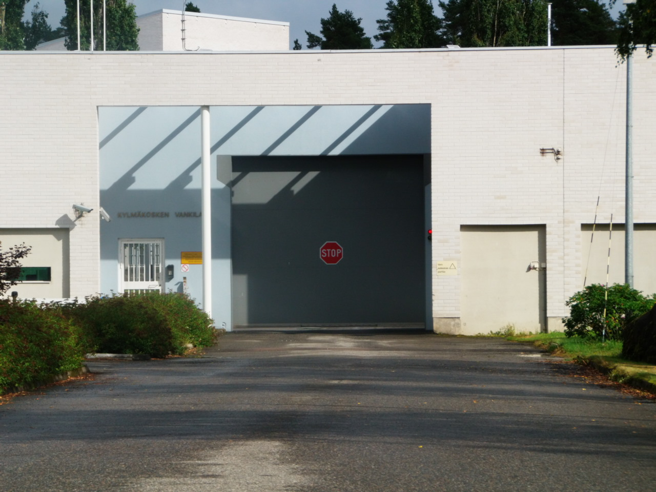 Kylmäkosken vankilan sisäänkäynti.